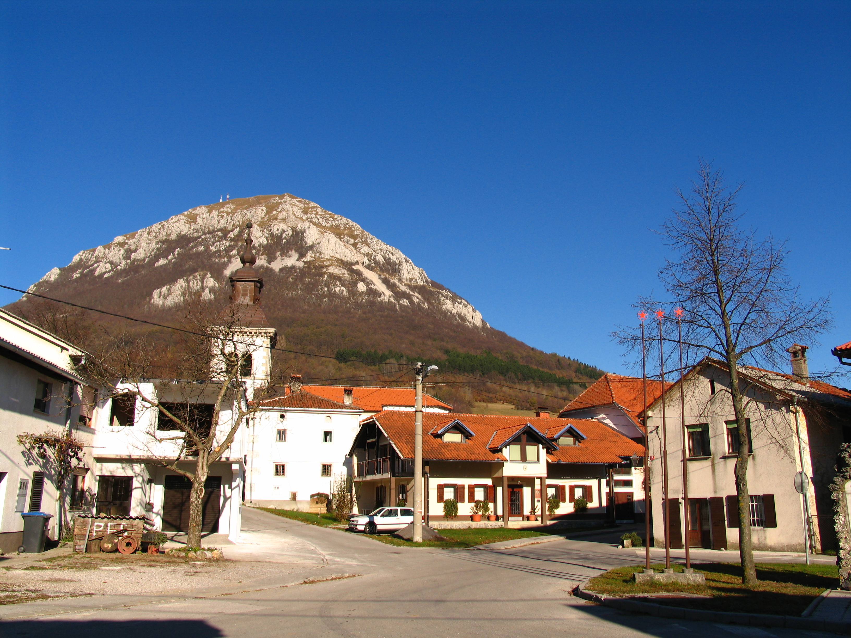 Razdrto